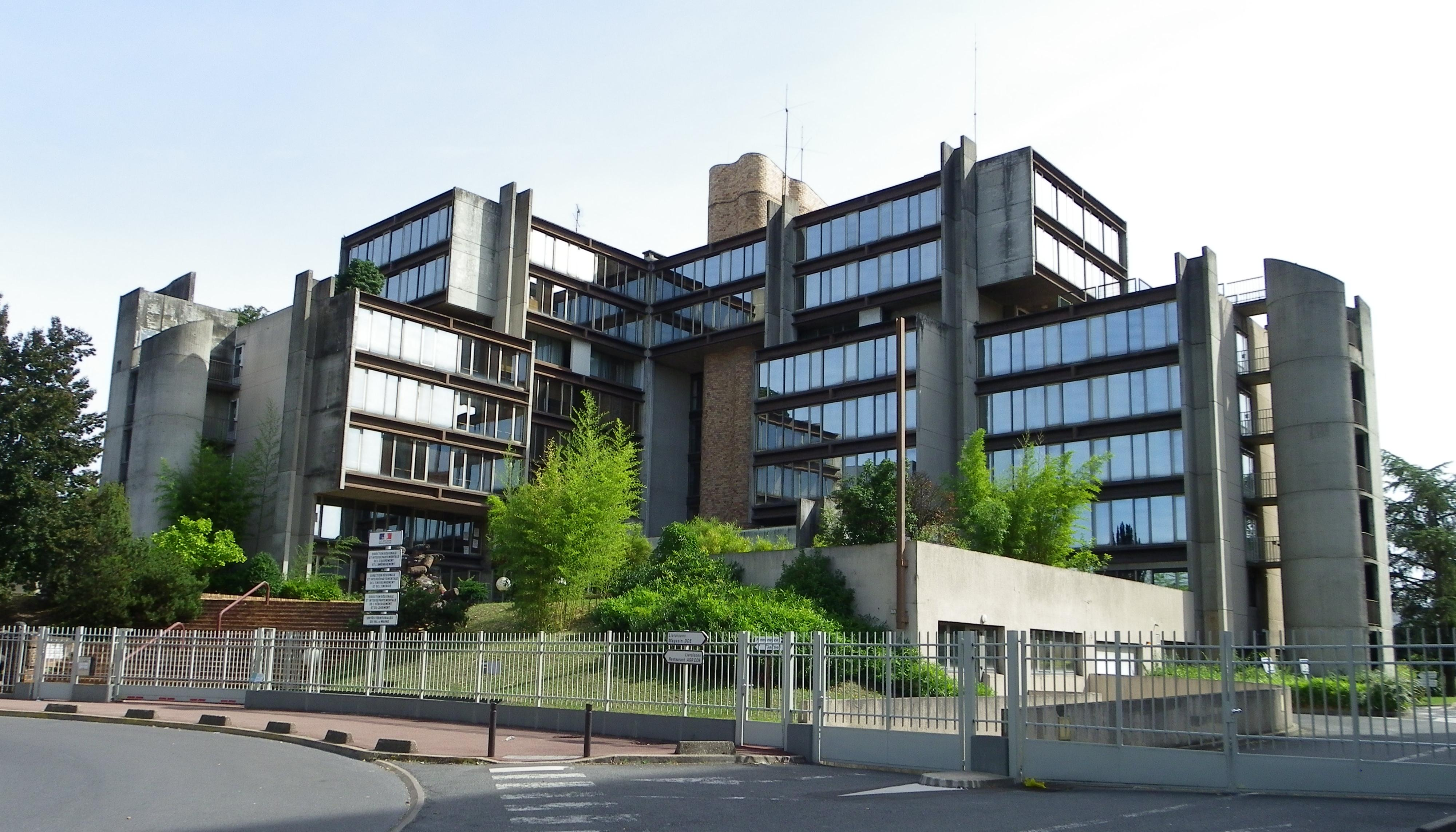 Directions régionales et interdépartementales de l'Equipement et de l'Aménagement, de l'Environnement et de l'Energie, et de l'Hébergement et du Logement ainsi que les Unités Territoriales du Val-de-Marne à Créteil